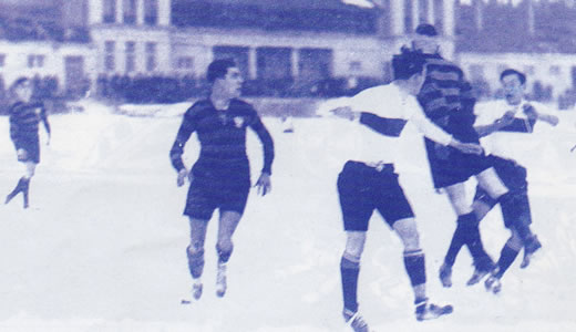 Durante la gira europea de Gimnasia, en Frankfurt (Alemania), bajo una intensa nevada.